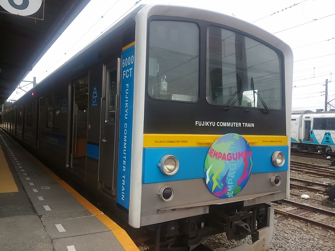 でんぱ組.incオリジナルヘッドマークを付けた富士急行6000系電車。2015年9月27日、河口湖ステラシアターでのライブイベント開催に伴い実施。河口湖駅にて撮影。